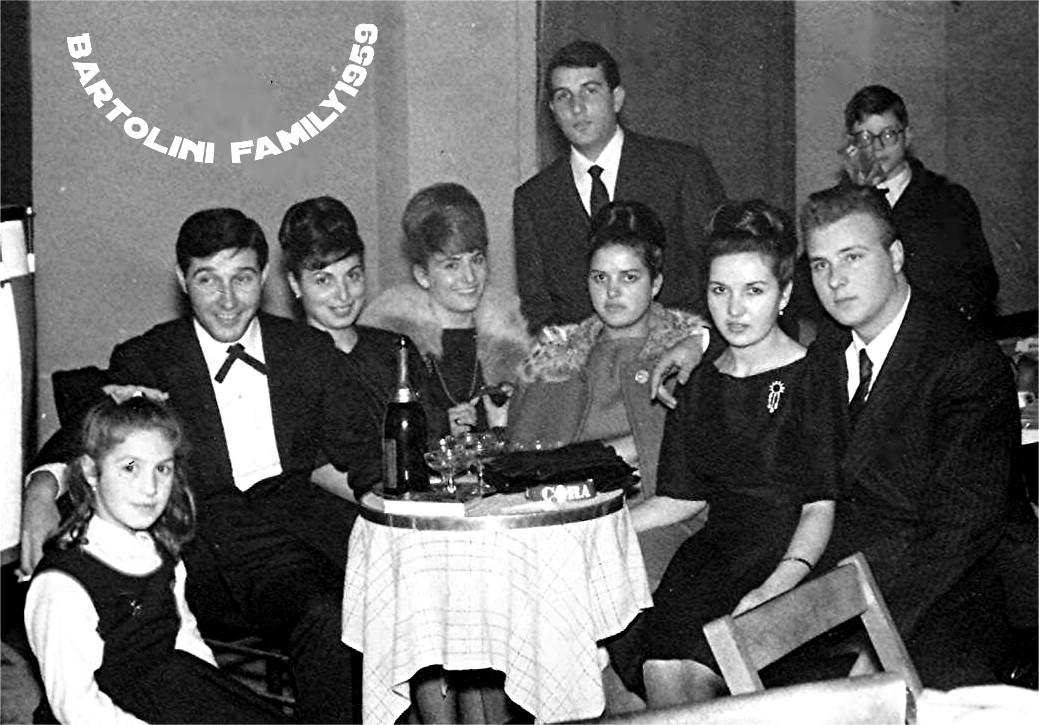 La famiglia Bartolini, anno 1959. Nella foto è ritratto anche il fratello di Rocco Montana (Lino Bartolini), ovvero il tenore Lando Bartolini